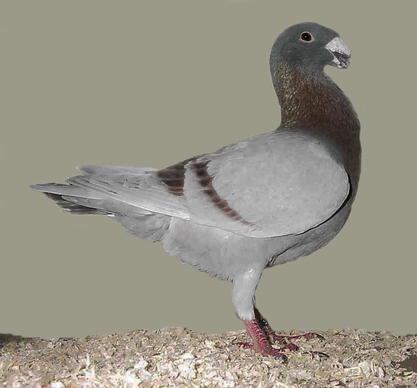 German Beauty Homer (Mealie)